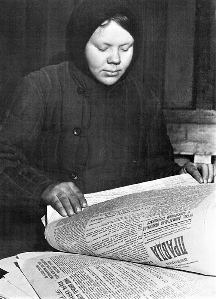 Сотрудница «Ленинградской правды» Ф. Крылова готовит газеты для отправки жителям блокадного Ленинграда